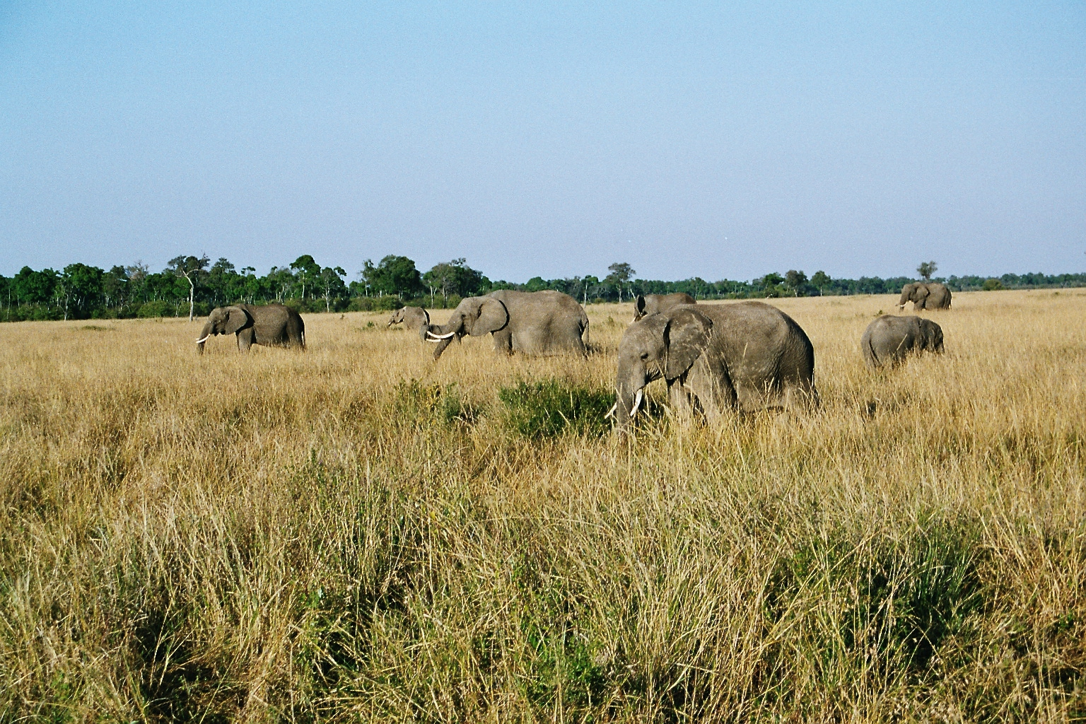 ケニアのサバンナ. Elefanter i Masai Mara, Kenya.